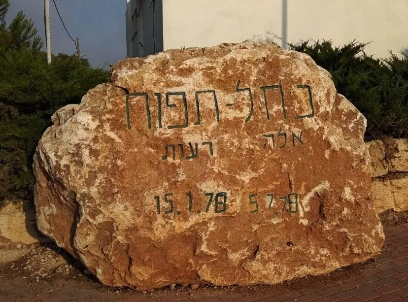 סלע זיכרון לגרעין נח"ל "אלה רעות" שהיה בתפוח עד הקמת היישוב.